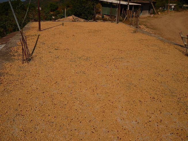 Secado de cafe en Guadalupe Nuevo Centro